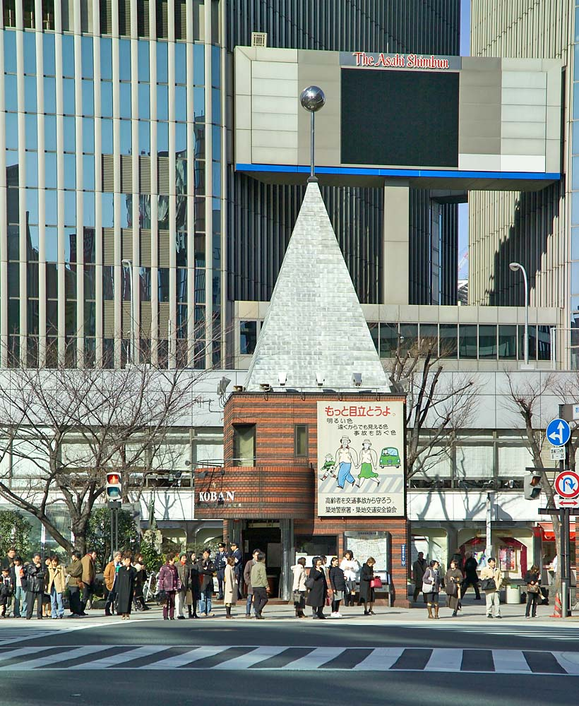 Koban Police Box Ginza Tokyo Japan